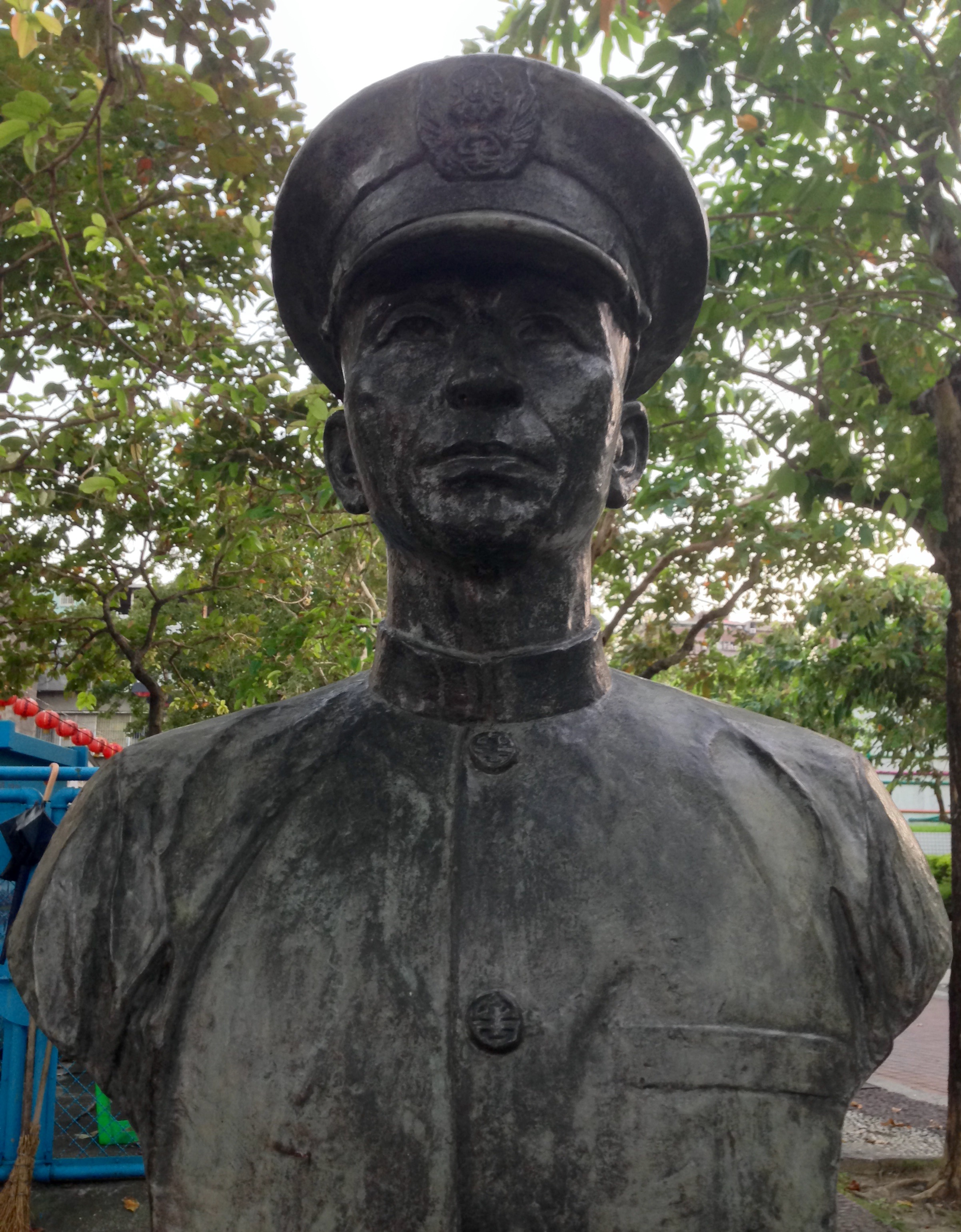 高施傳銅像